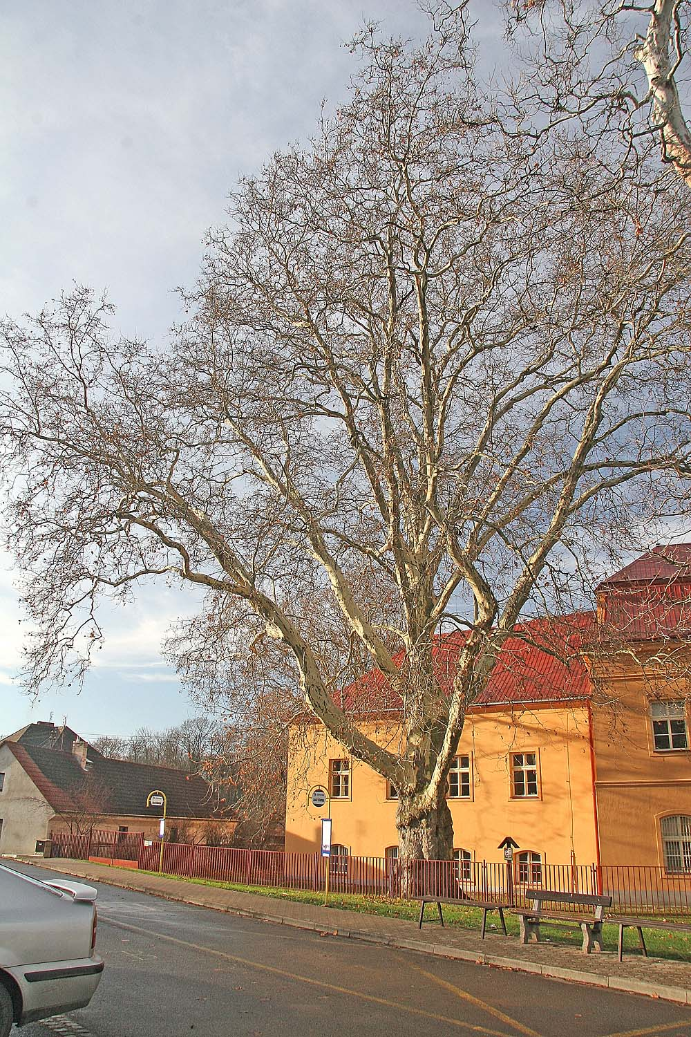 Platan v Běstvině - památný platan javorolistý (Platanus hispanica) u zámku v obci Běstvina, district Chrudim autor: Prazak date: 15. 12. 2006